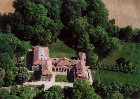 Peresznye, Hungary, aerialphotgoraphy